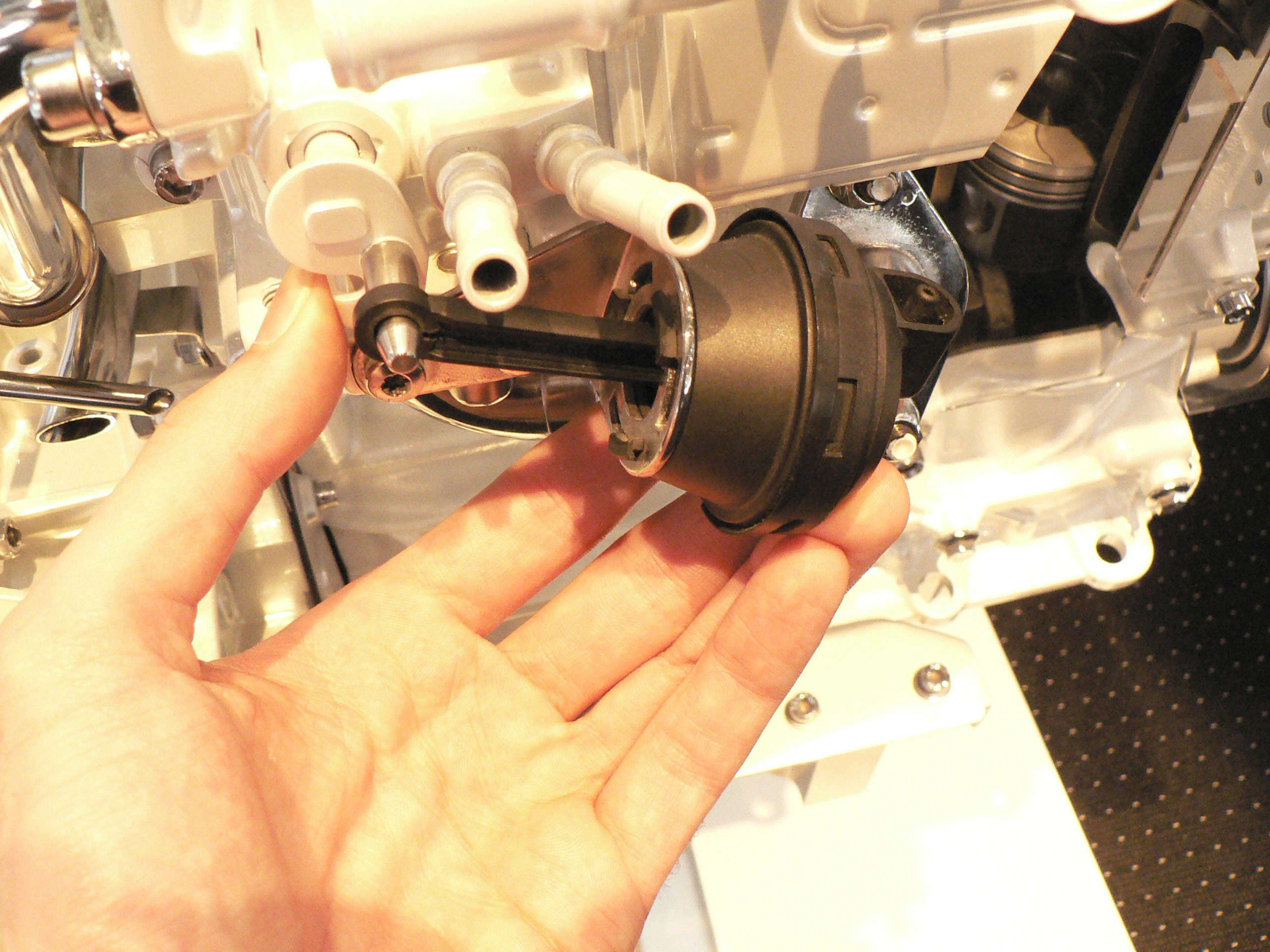 Mondial de l automobile de Paris (October 2006)